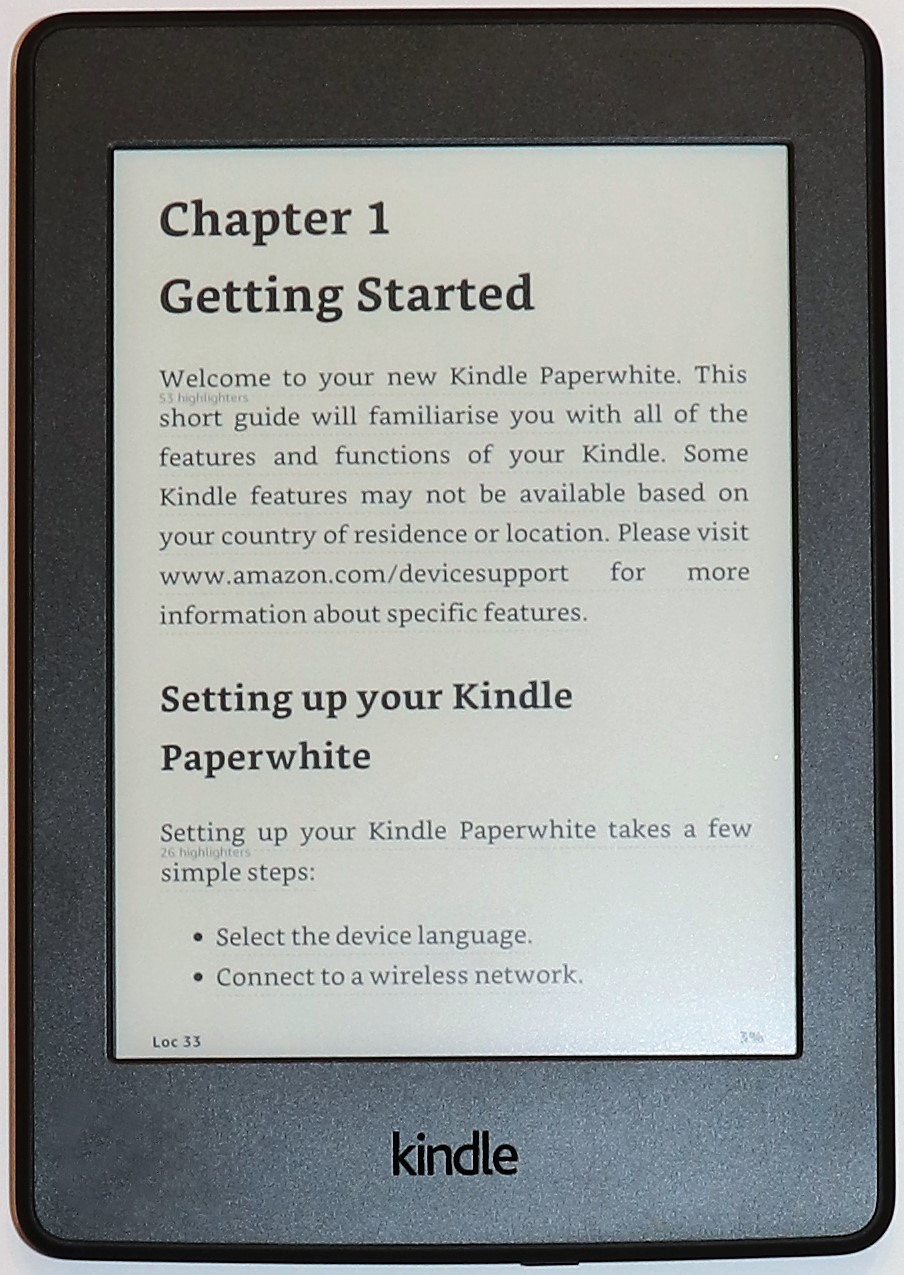 Czytnik e-booków Kindle Paperwhite 3 firmy Amazon